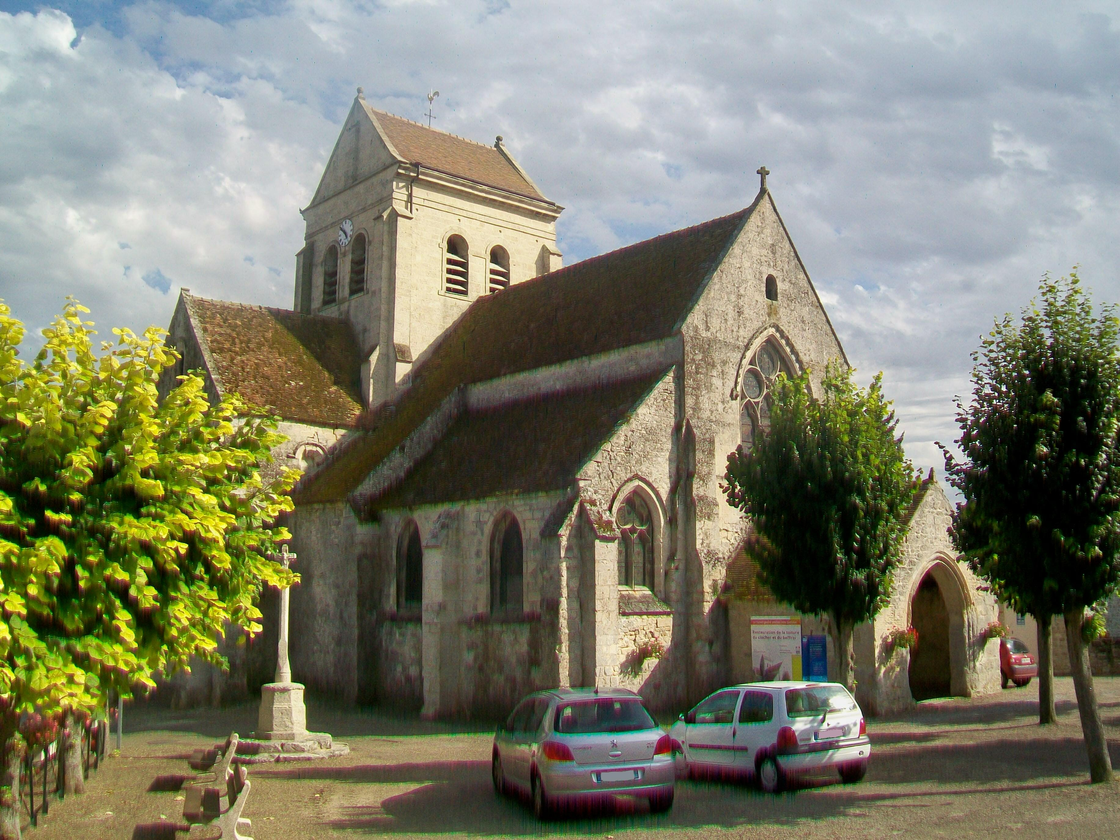 Vue d'ensemble depuis le nord-ouest.